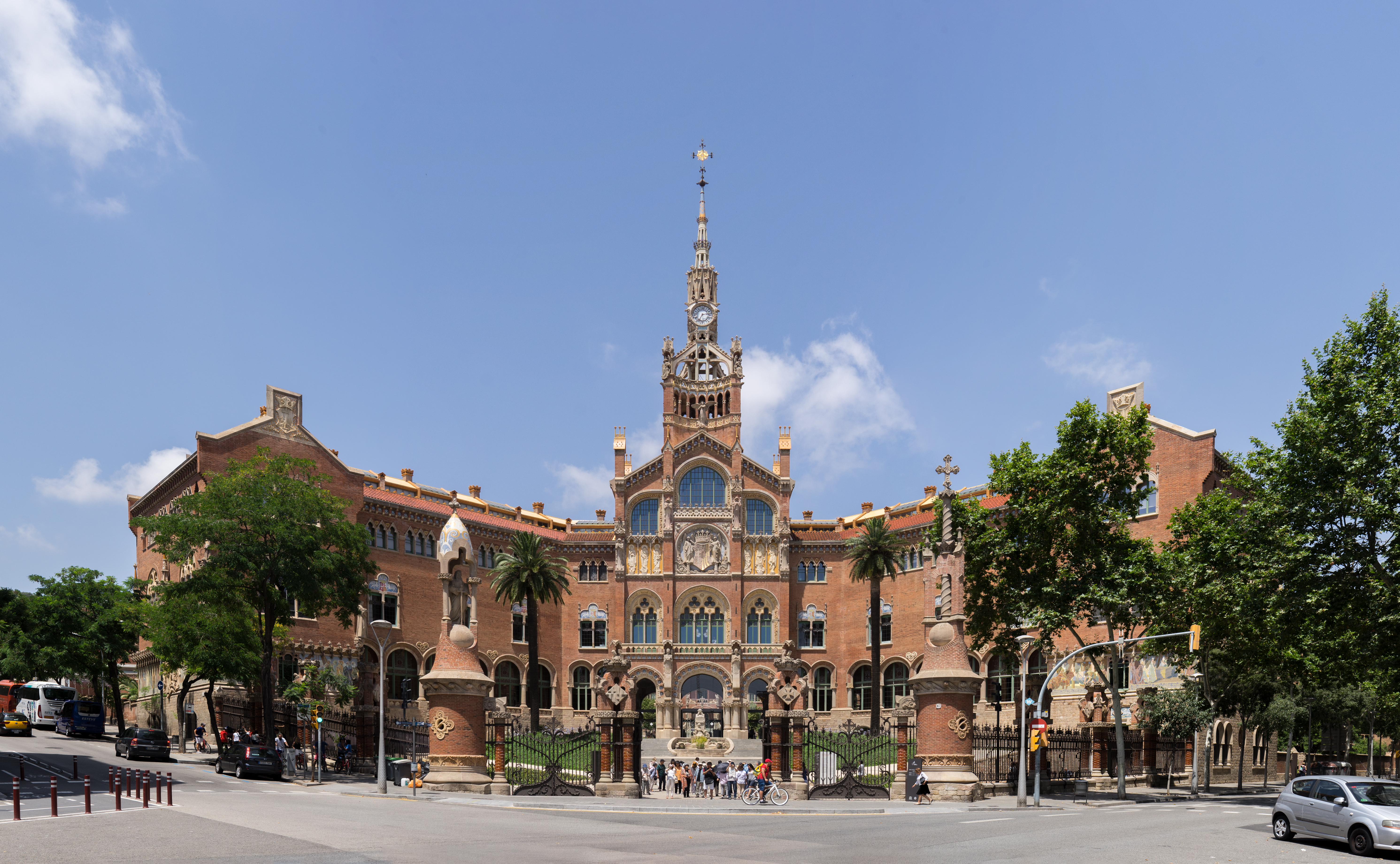 Hospital Sant Pau, main facade